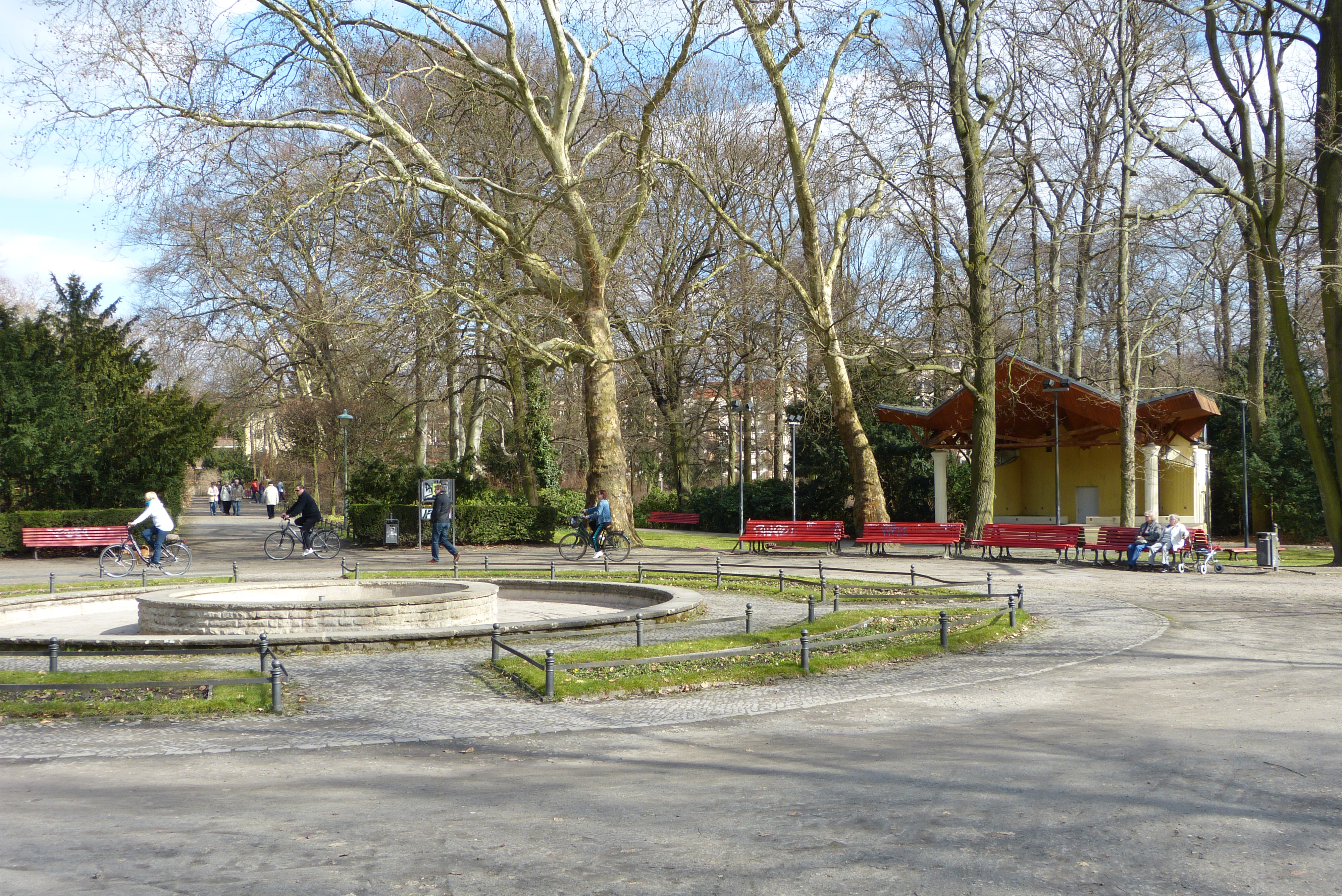 Berlin-Steglitz, Stadtpark Steglitz